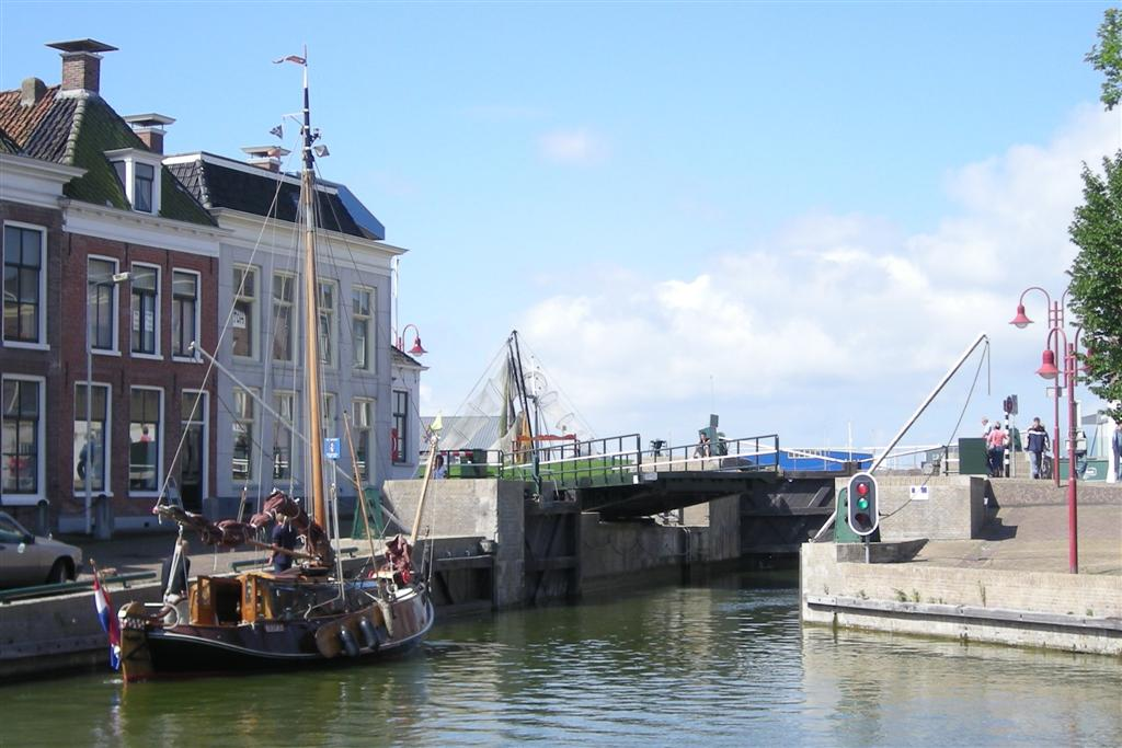 Sluis Makkum / Canal Lock in Makkum